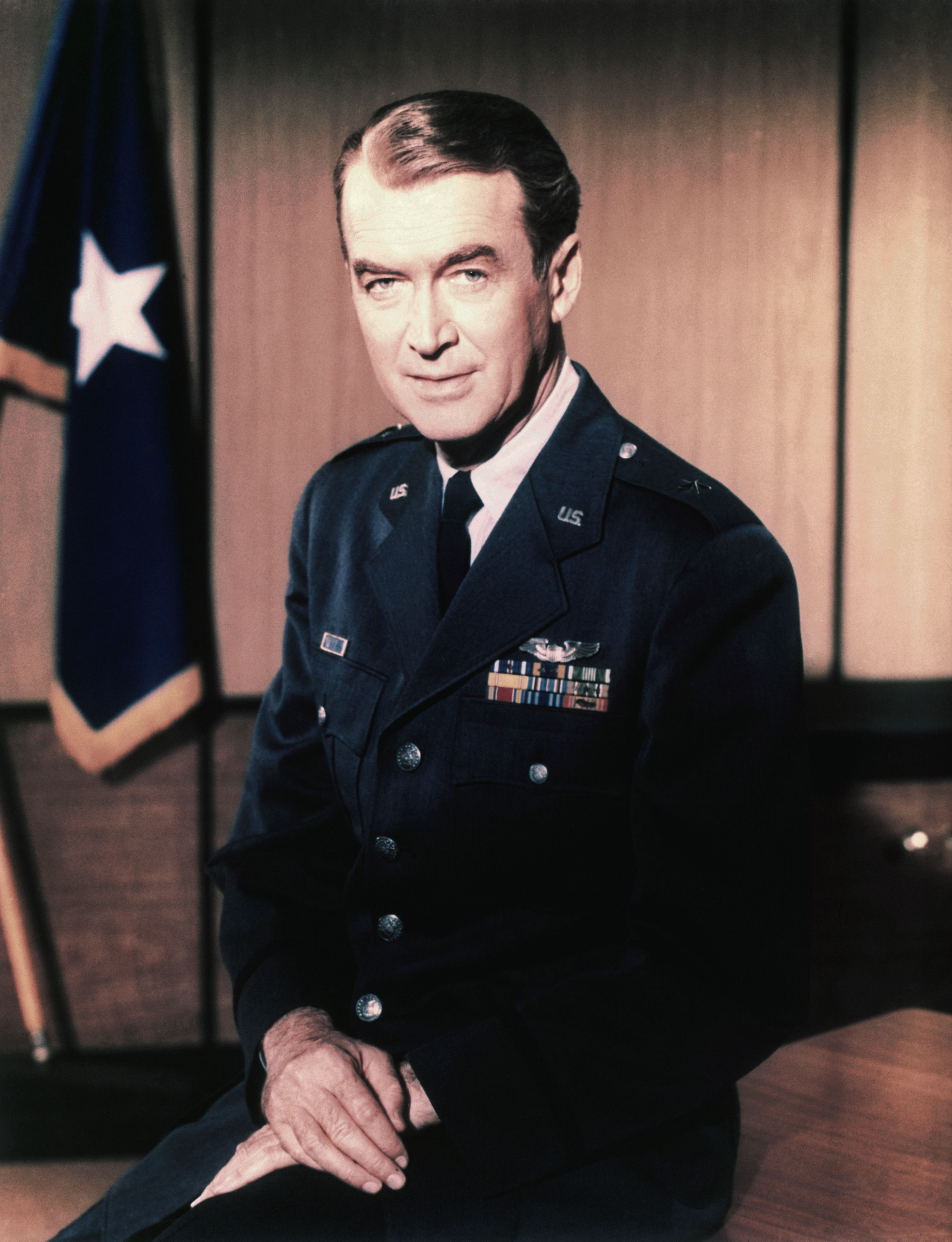 Brig. Gen. James M. Stewart, USAF Reserve.